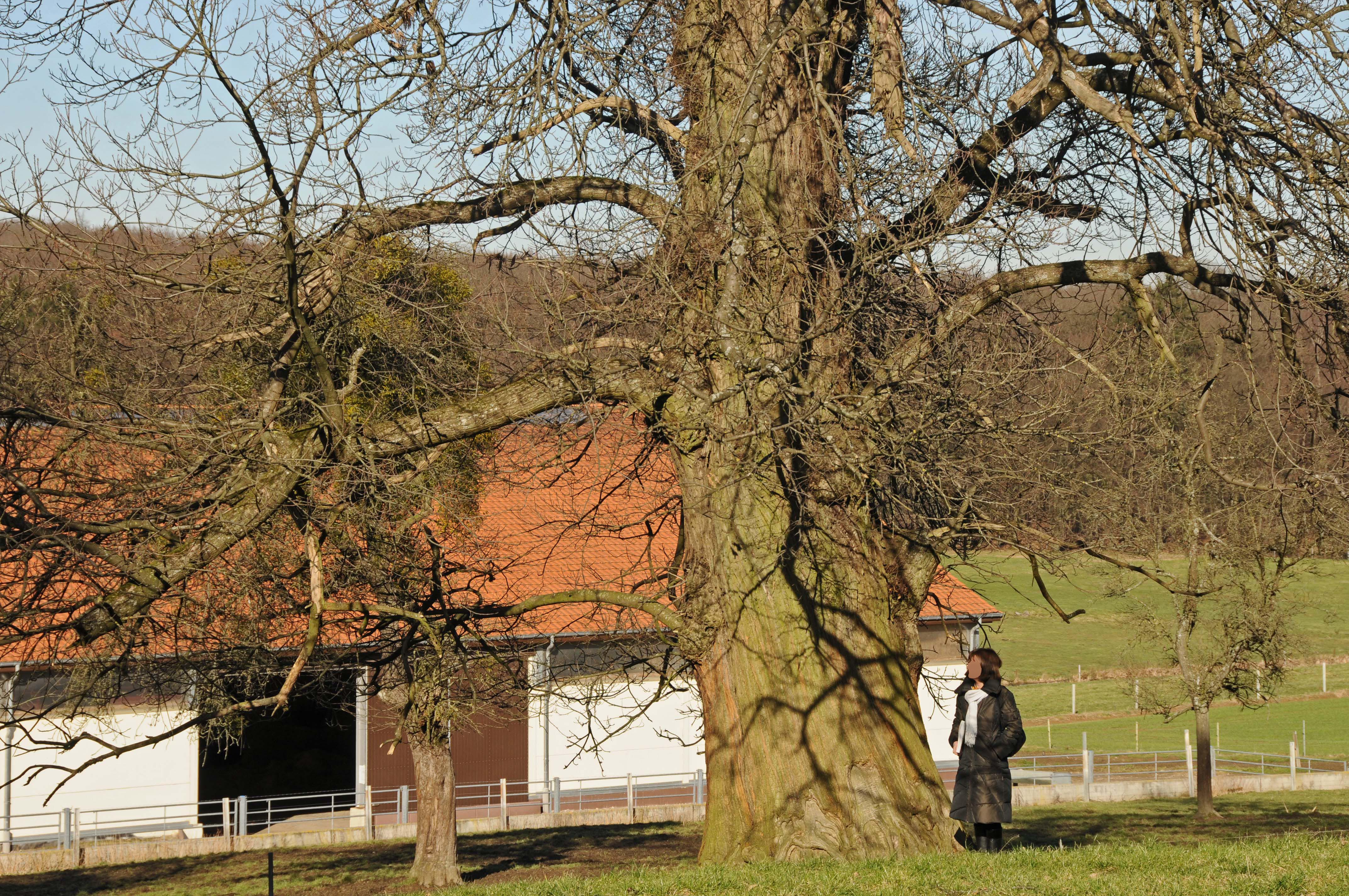 Le châtaignier européen remarquable à Pleitrange (Contern, Luxembourg)